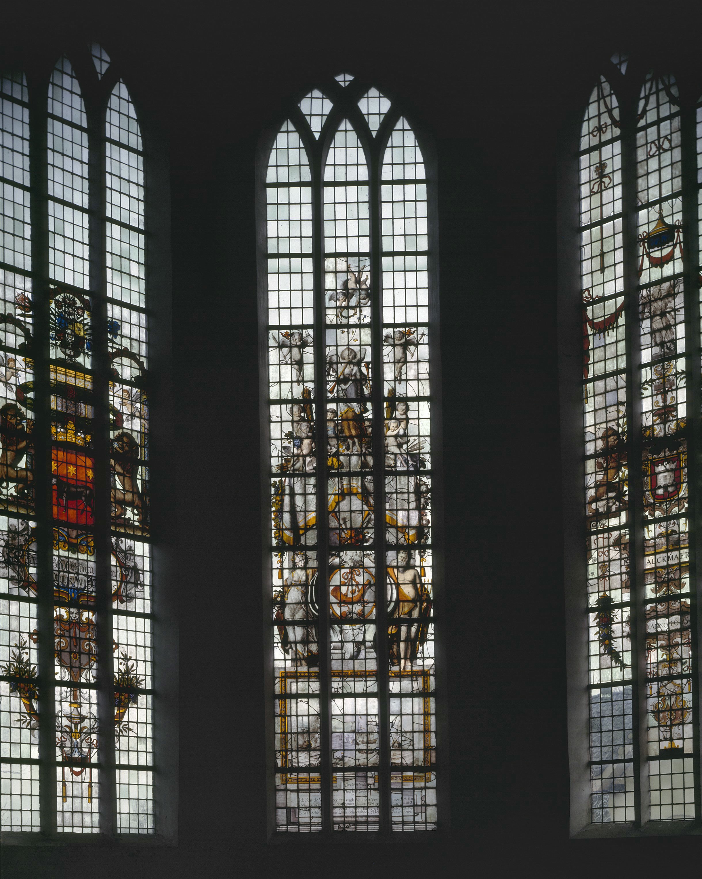 Nederlands Hervormde Kerk: Interieur gebrandschilderde ramen, raam 8